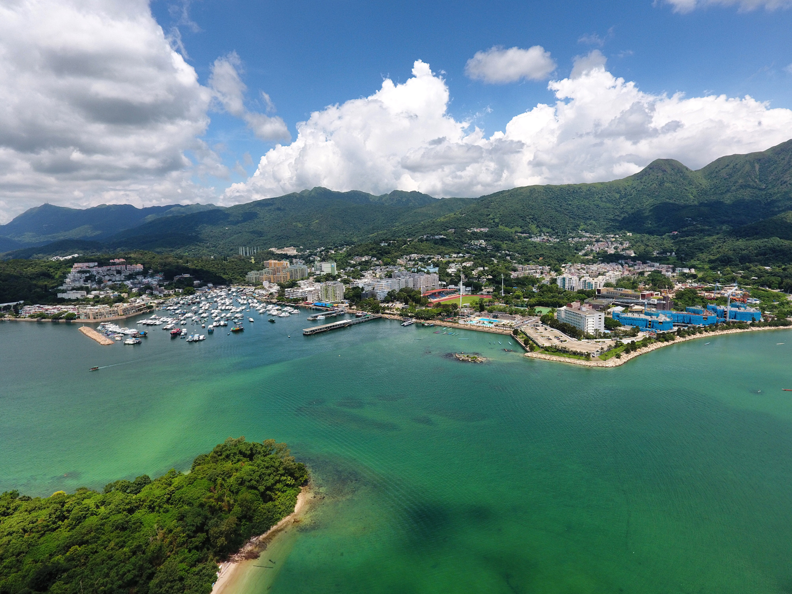 Sai Kung Town Aerial View